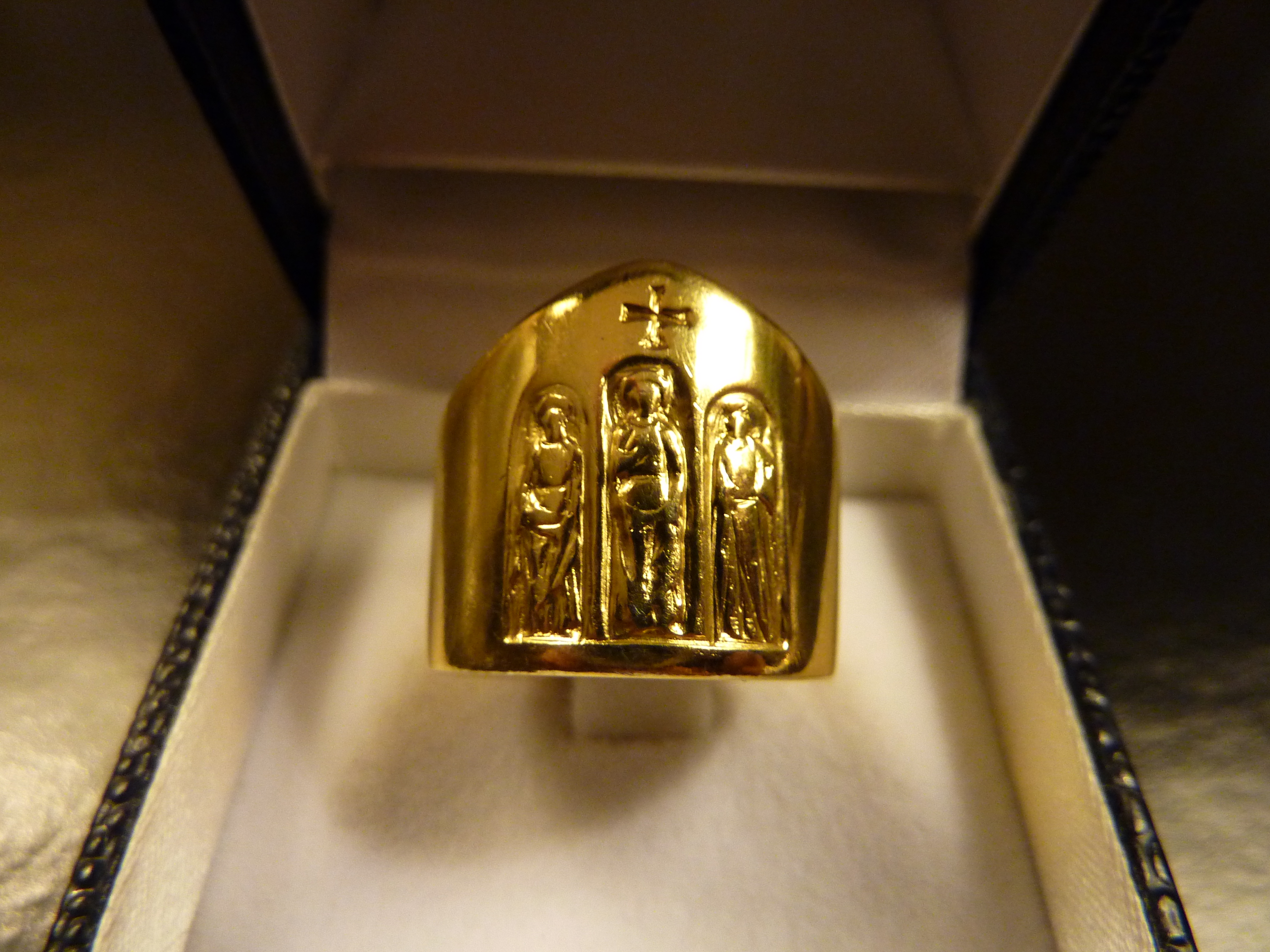 Reproduction dorée de l'Anneau du Concile Vatican II, anneau offert à tous les Pères conciliaires par le Pape Paul VI, en signe de Communion, en décembre 1965, à l'occasion de la clôture du Concile oecuménique Vatican II (1962-1965)